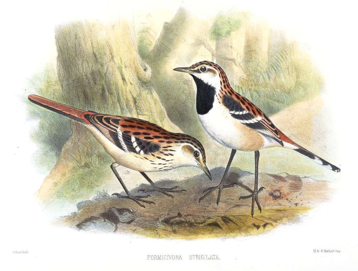 Formicivora strigilata = Myrmorchilus strigilatus